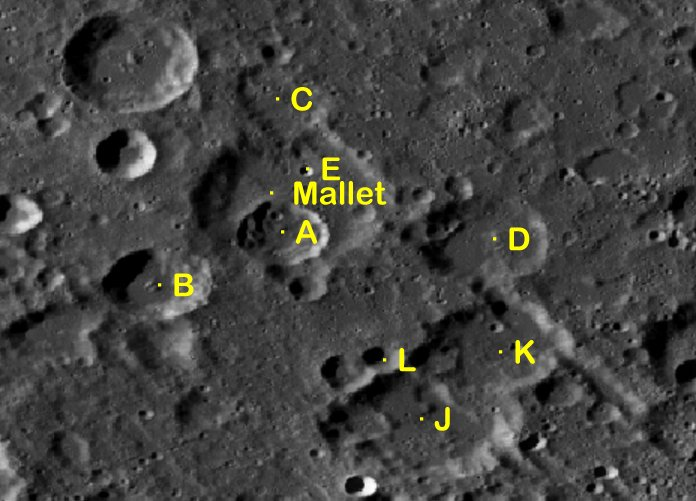 Cráter lunar Mallet. Cráteres satélite. (Imagen LRO)